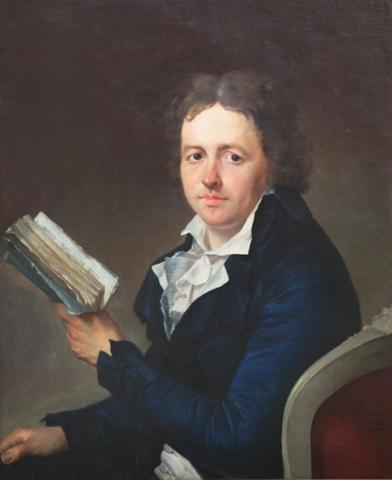 Portrait de Joseph Jacotot (1770-1840) par Benjamin Delapierre Huile sur toile, signée et datée en bas à droite Delapierre 1798 77 x 63 cm